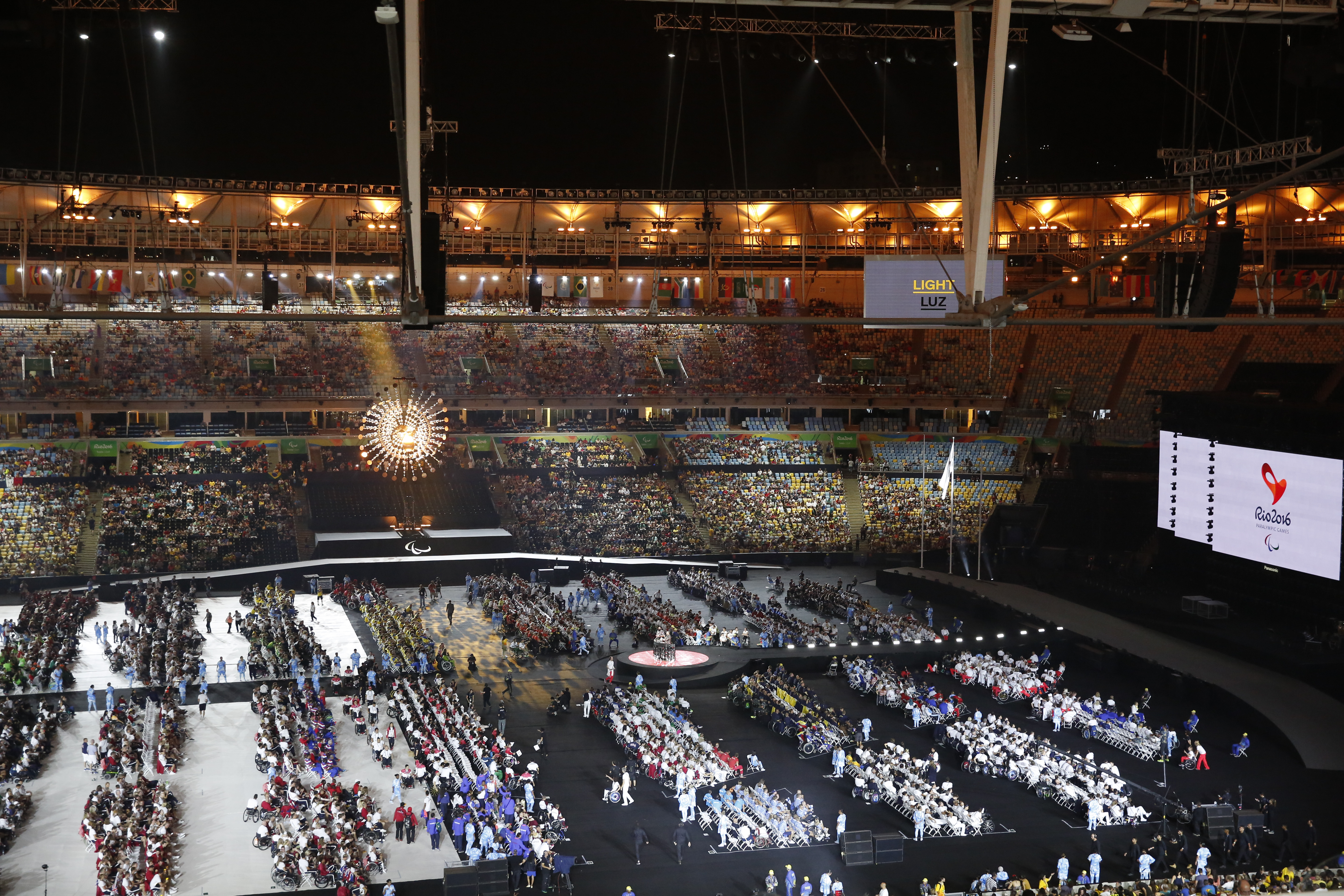 Rio de Janeiro - Cerimônia de encerramento dos Jogos Paralímpicos Rio 2016 no Estádio do Maracanã (Tomaz Silva/Agência Brasil)